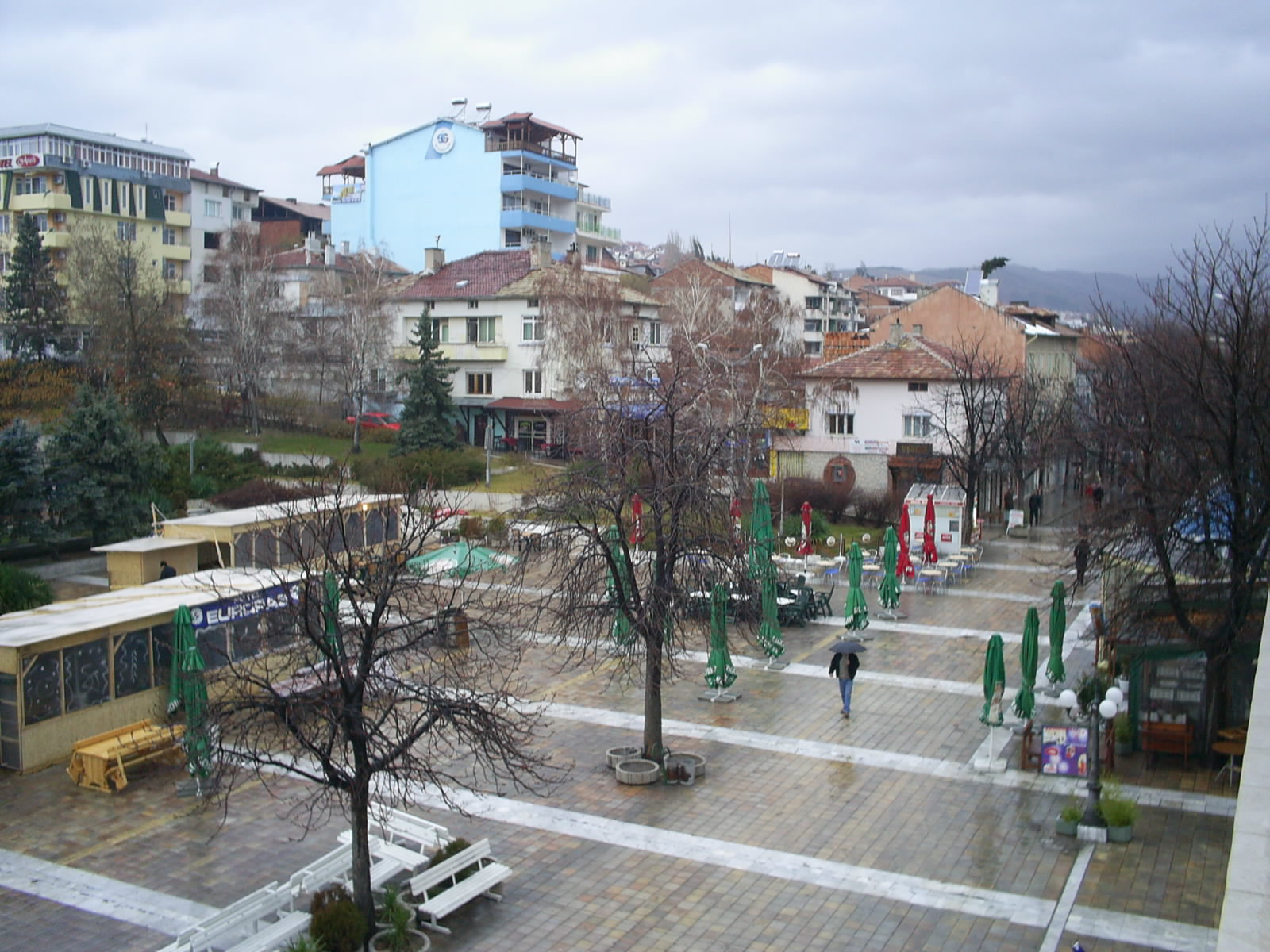 Центърът на Сандански; © 2005 Свилен Енев